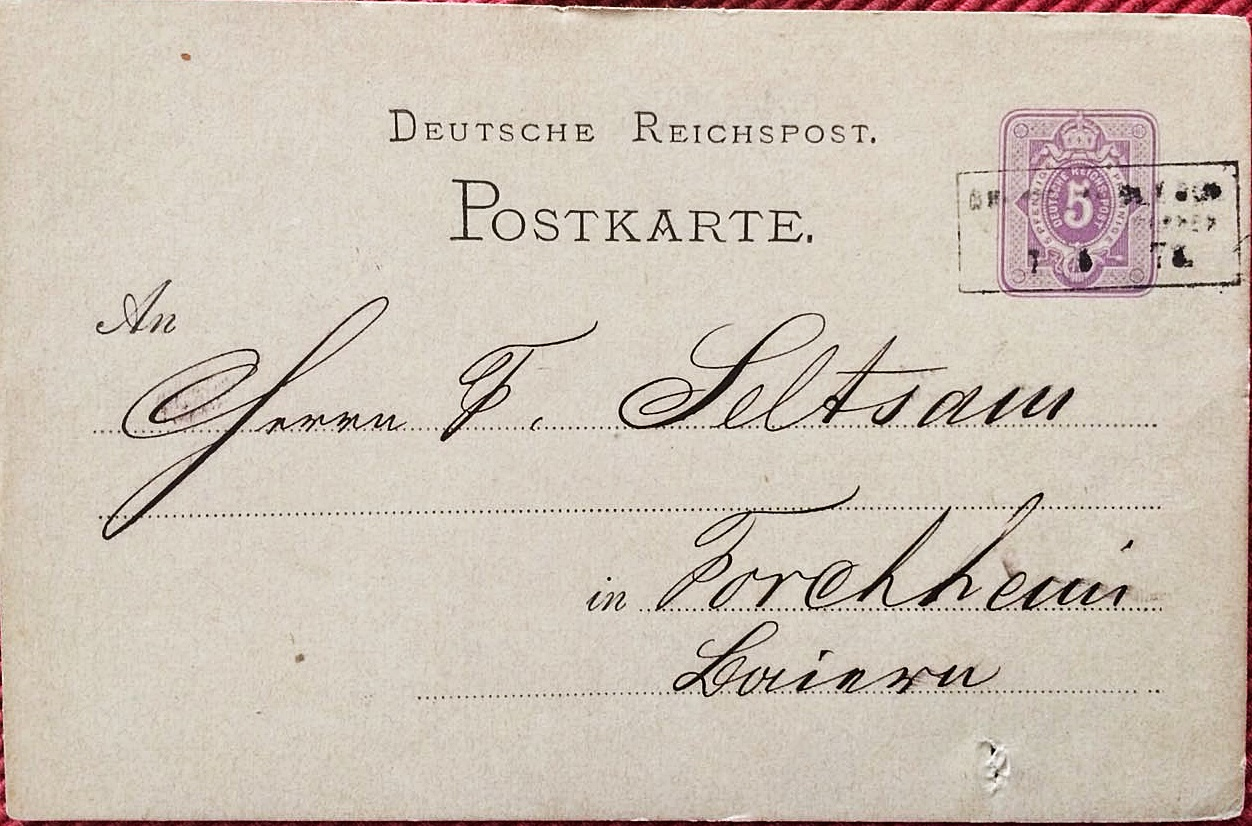 Postkarte, 1878, adressiert an den Leim-Fabrikanten Friedrich Seltsam (+ 1887) in Forchheim